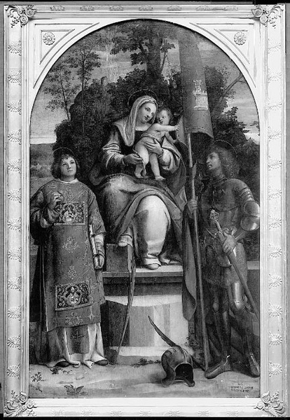 Thronende Maria mit dem Kind und den Heiligen Stephanus und Viktor von Agaunum. Pappelholz 252,5 x 158,5 cm, 1511/LAVRENCIVS LVCIVS/FELTRENIS PINGAT, Gemäldegalerie Berlin